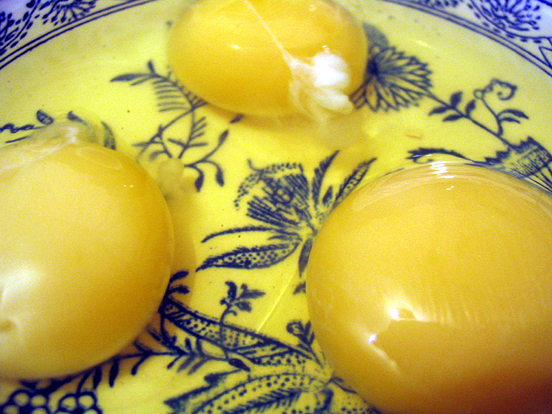 Eggs